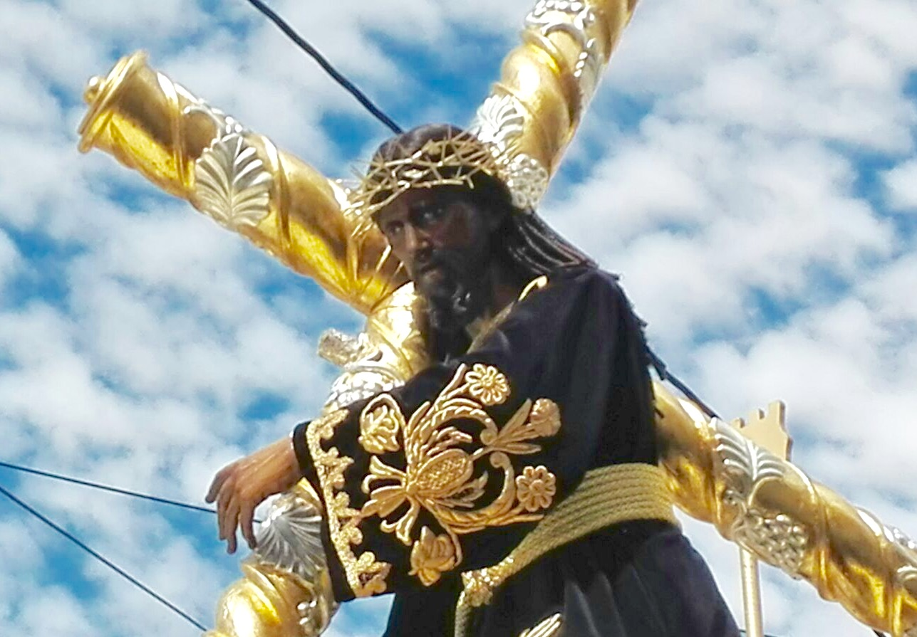 Procesión de Jesús Nazareno de la Iglesia de Santo Domingo. Tercer domingo de cuaresma de 2016 en la Ciudad de Guatemala.